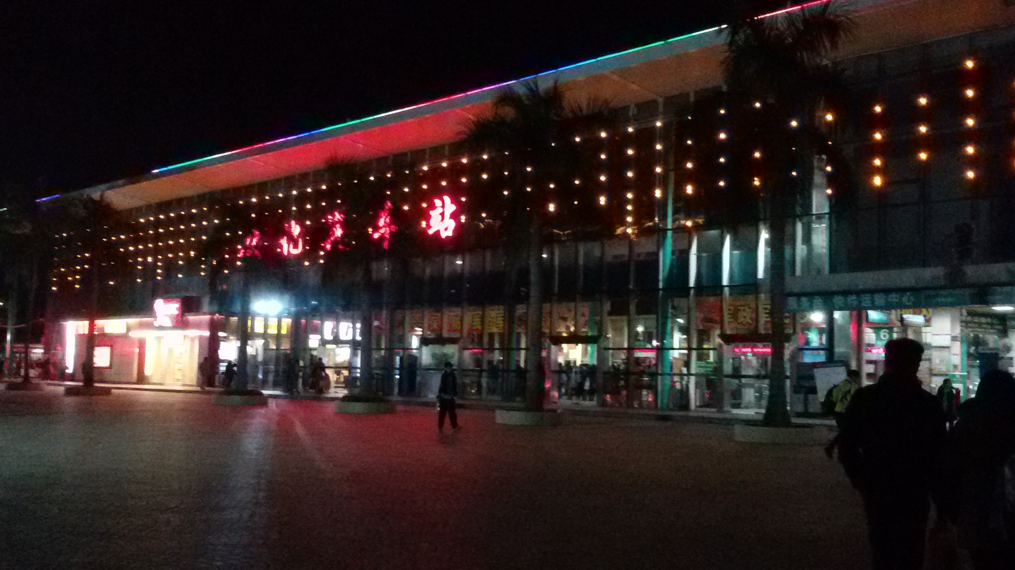 粵語: 从化汽车客运站